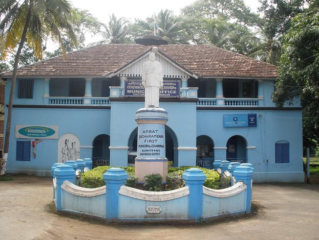 ചിറ്റൂർ തത്തമംഗലം മുനിസിപ്പാലിറ്റി